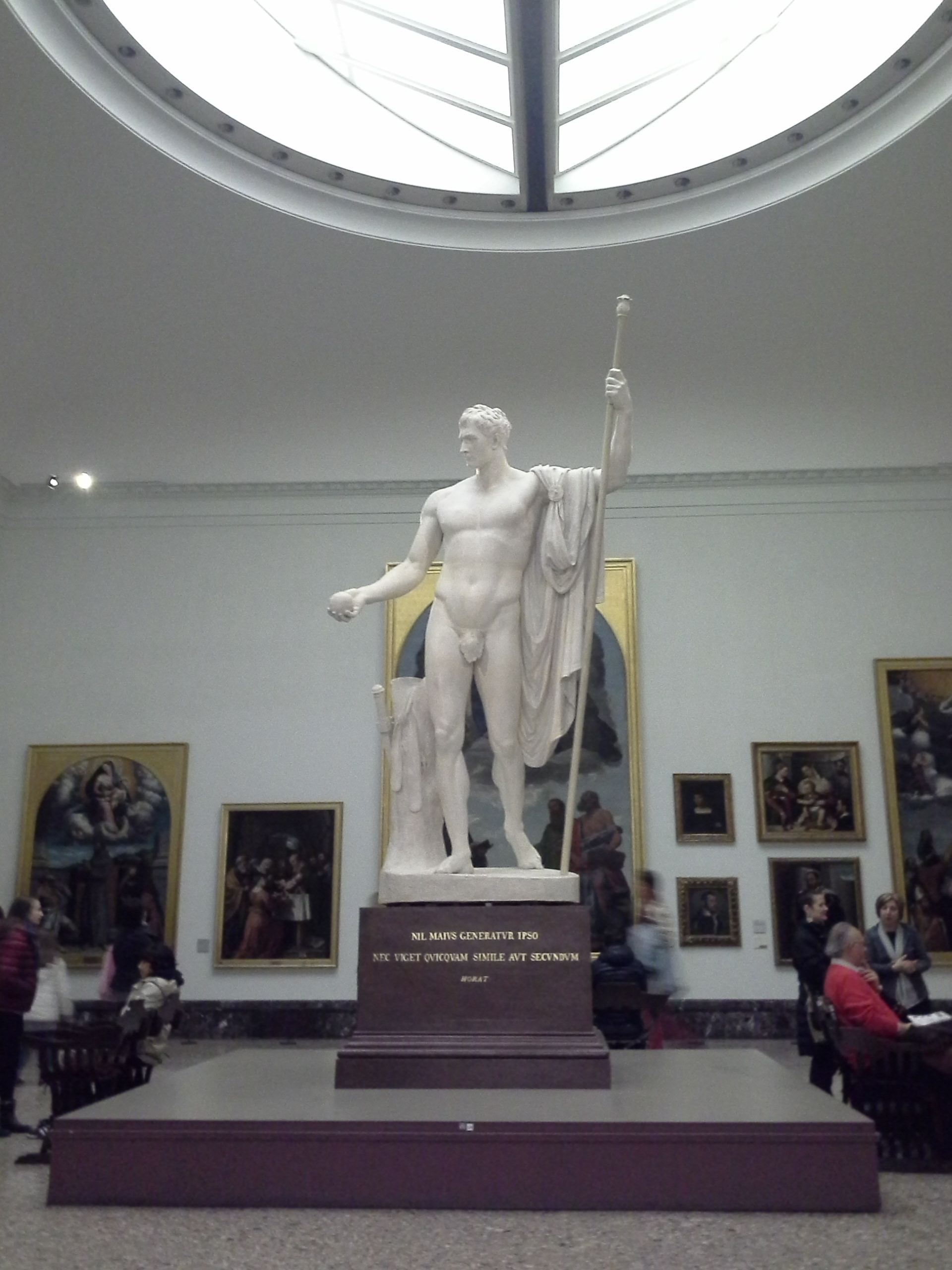 Antonio Canova, Napoleone Bonaparte come Marte pacificatore (copia), Pinacoteca di Brera (Sala 14), Milano.